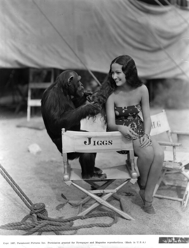 Dorothy Lamour (1914-1996), играет с шимпанзе по кличке Jiggs, в Palm Springs на съемках 'Her Jungle Love', студия Paramount. 1937